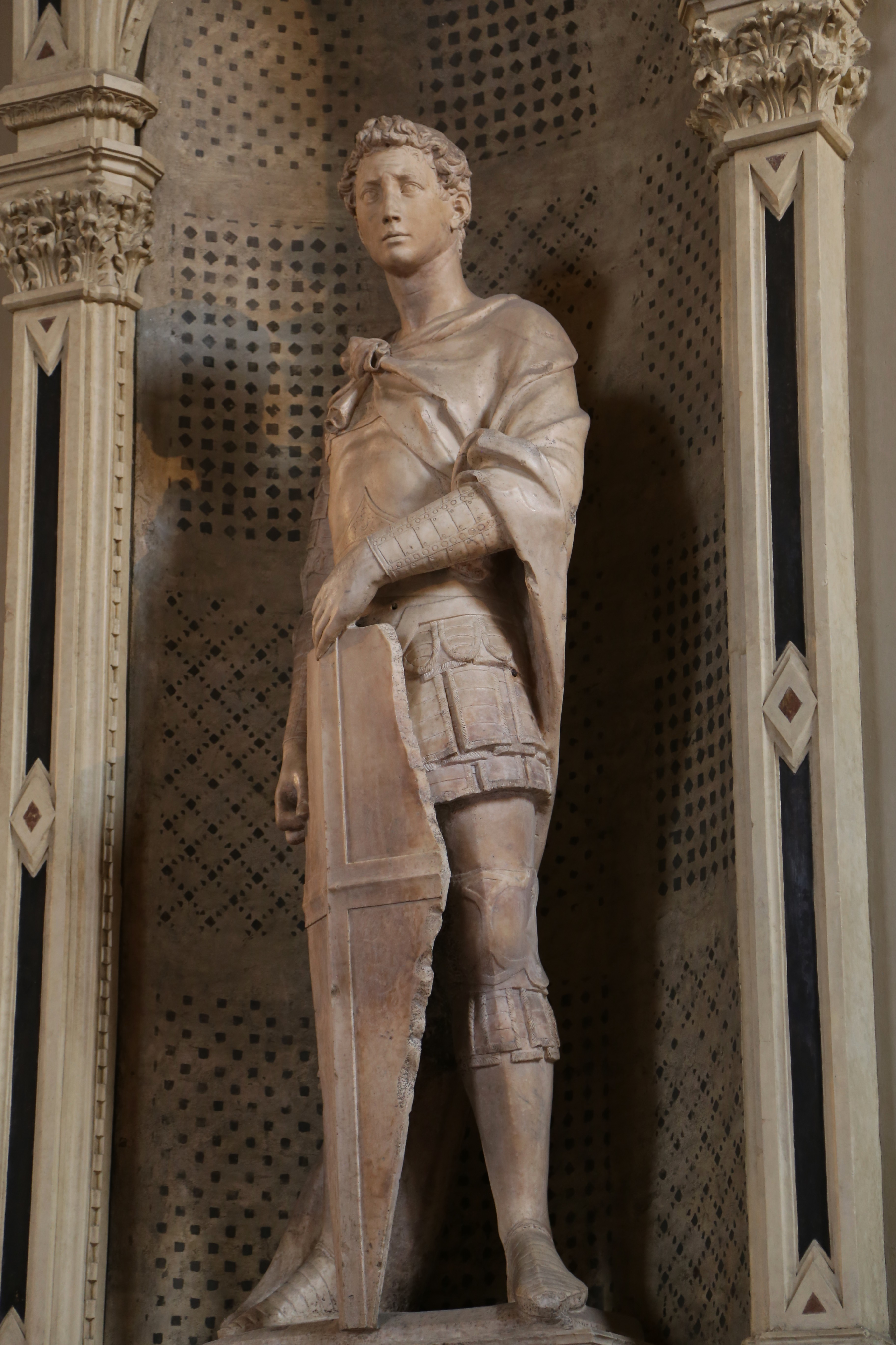 St. Georg, Donatello, ca. 1416-17, Museo del Bargello, Florenz